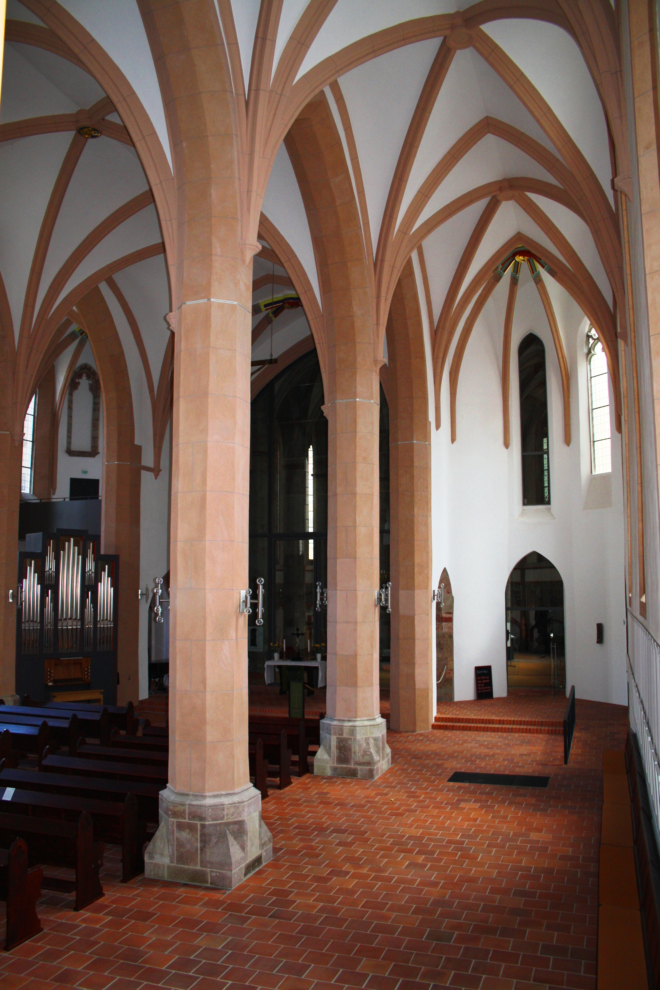 Blick in das südliche Seitenschiff nach Osten